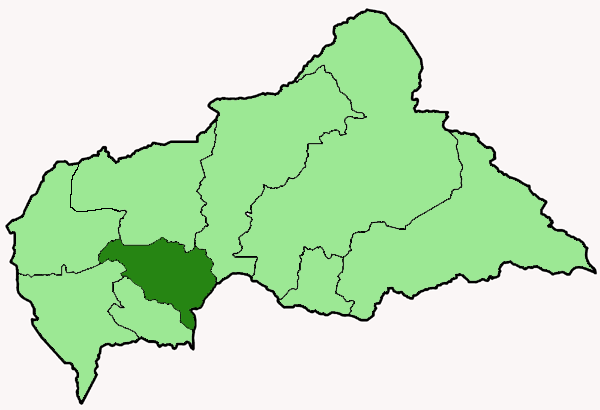 Mappa dell'arcidiocesi cattolica di Bangui, nella Repubblica Centrafricana. ANno 2009.